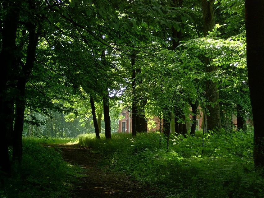 Skłudzewo gm. Zławieś Wielka. Zdjęcie z okalającego dwór parku